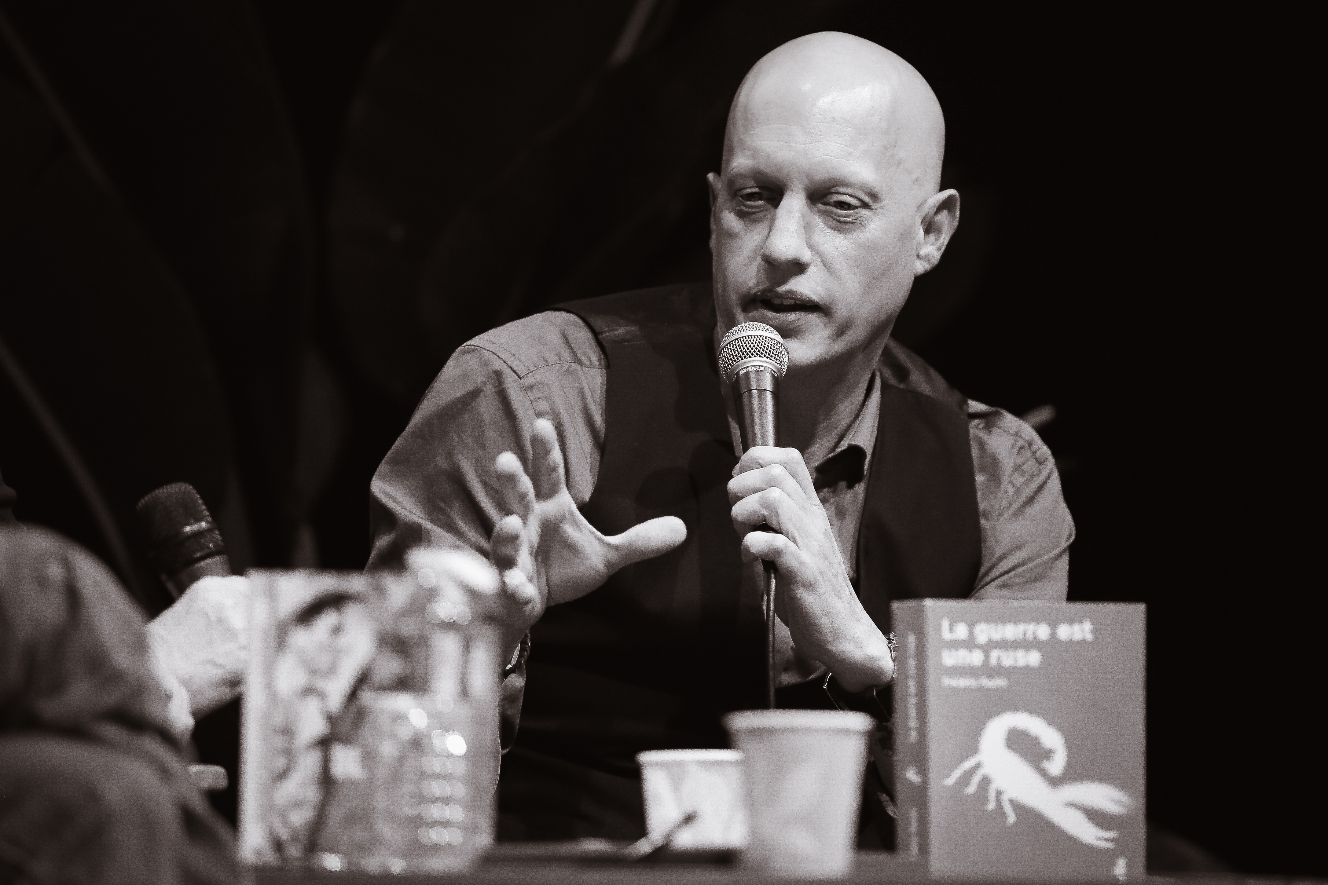 Photo prise lors du festival Jardin d'Hiver à Rennes en février 2019